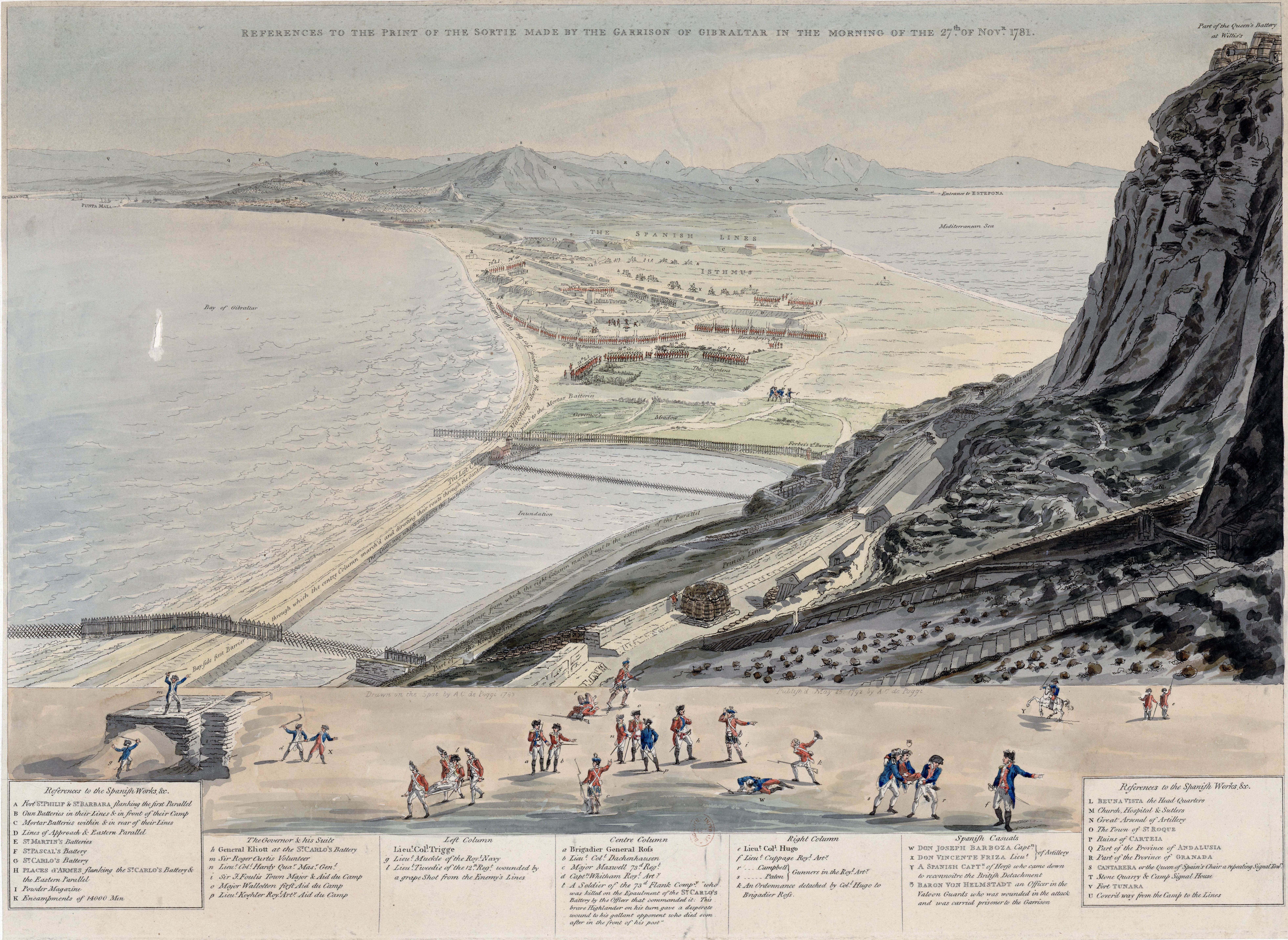 Sortie de la garnison de Gibraltar dans la nuit du 27 novembre 1781